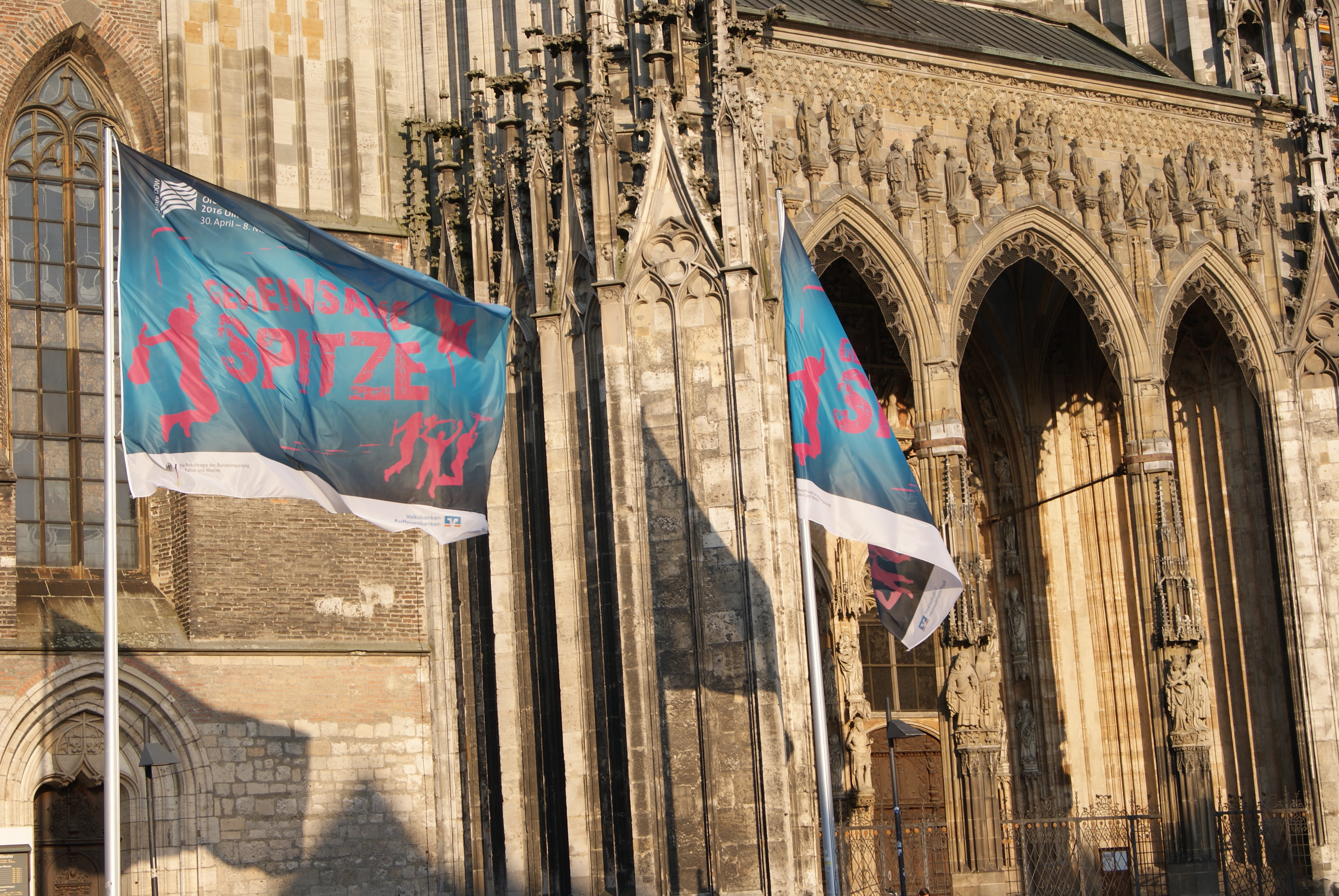 Orchesterwettbewerb 2016 Ulm - Münsterplatz